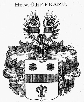 Wappen der Herren von Oberkamp (1629 mit Reichsritterstand geadelt)